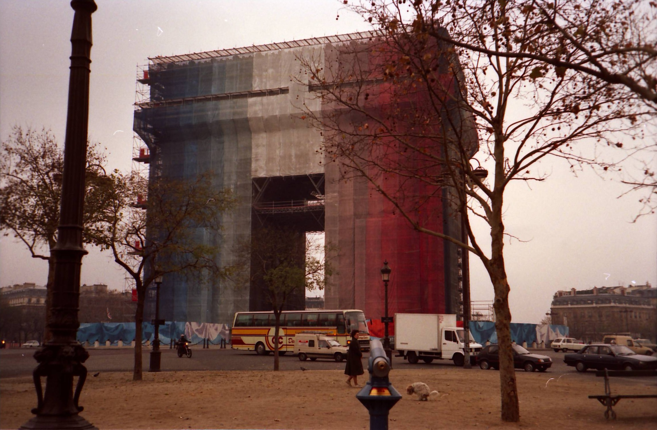 Arc de Triomphe, Paris, France.